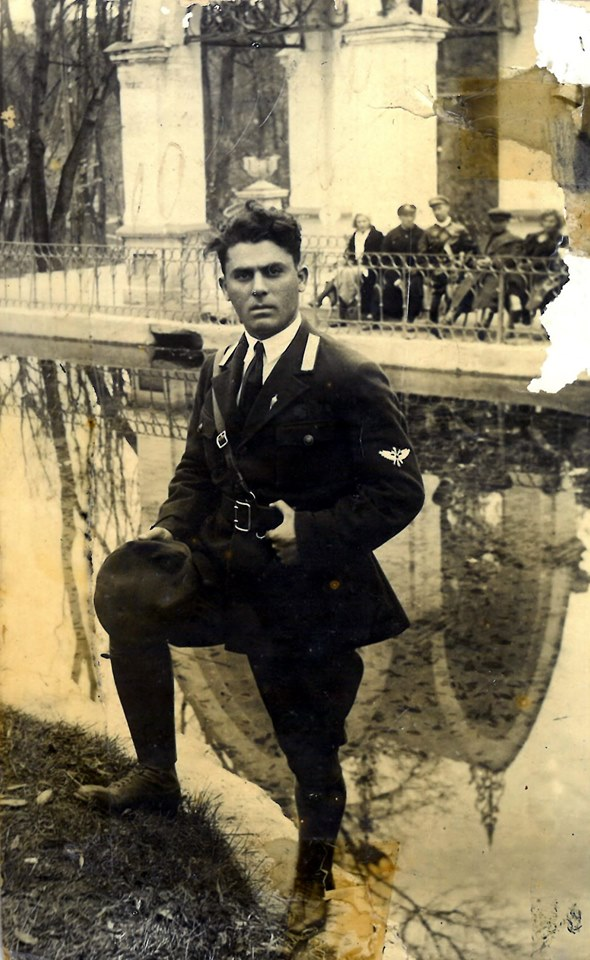 Azerbaijani immigrant pilot Mohammed Altunbay.